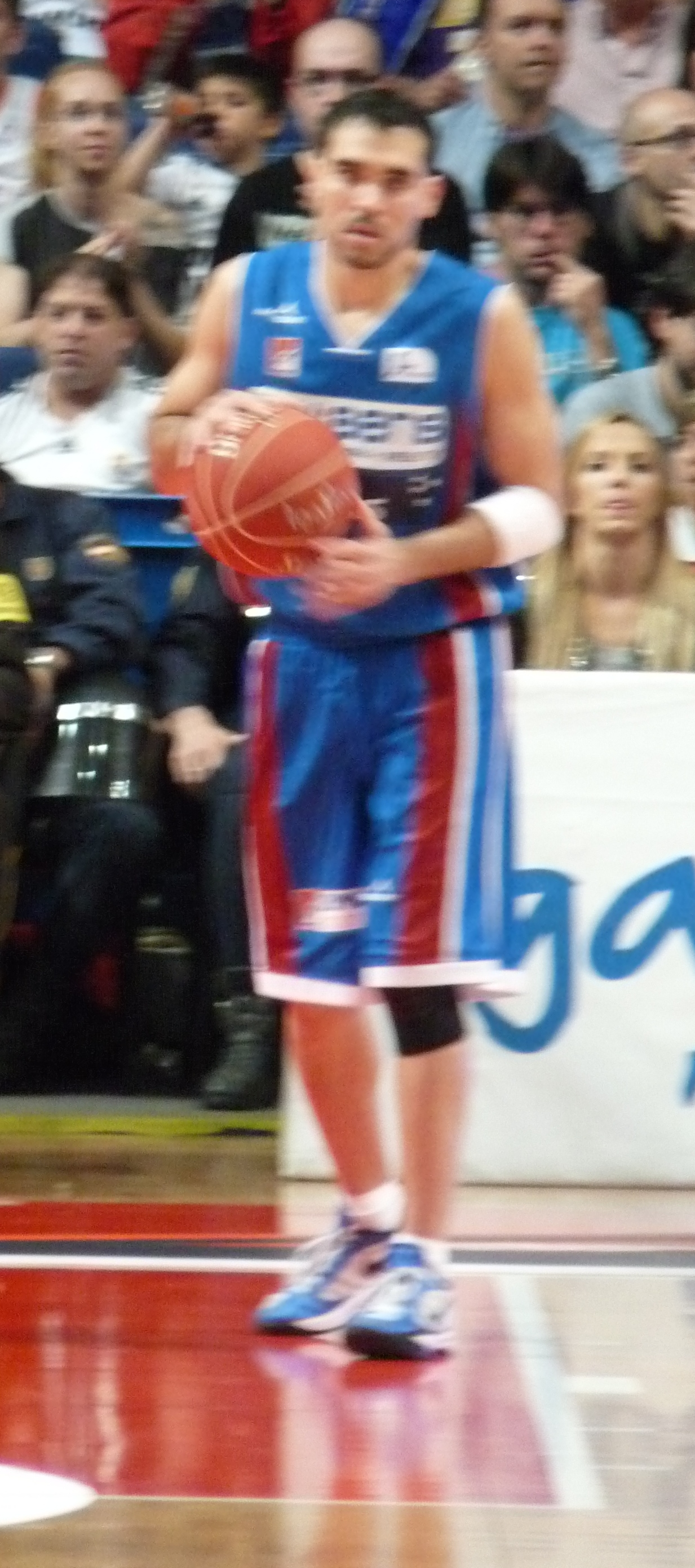 Andrés Rodríguez, jugador de baloncesto de Puerto Rico